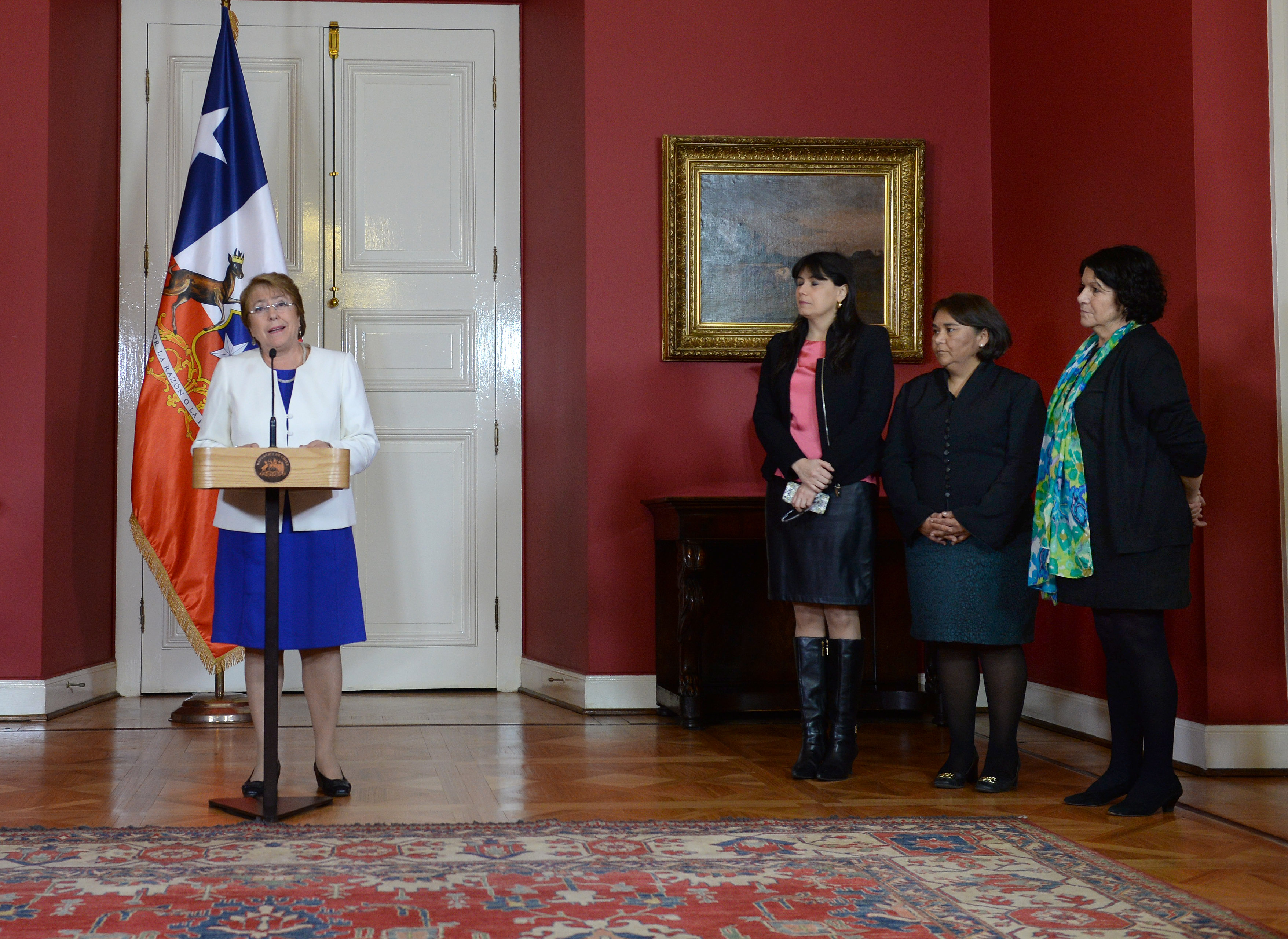 Gobierno de Chile